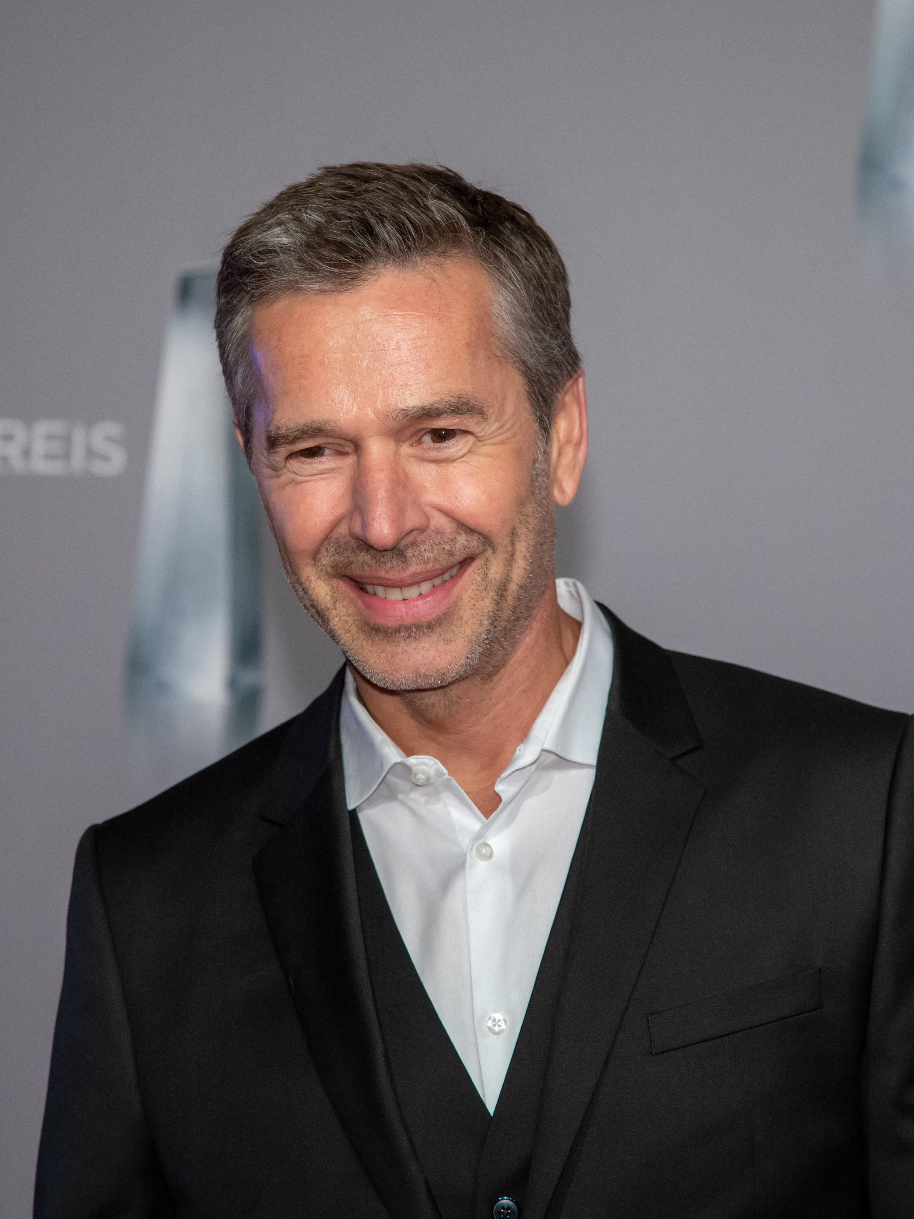 Dirk Steffens beim Deutschen Fernsehpreis 2019 in der Düsseldorfer Rheinterrasse